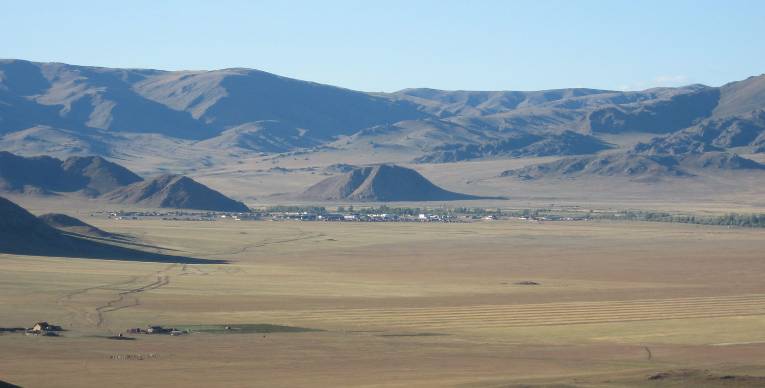 Bürentogtokh sum centre, Khövsöl province